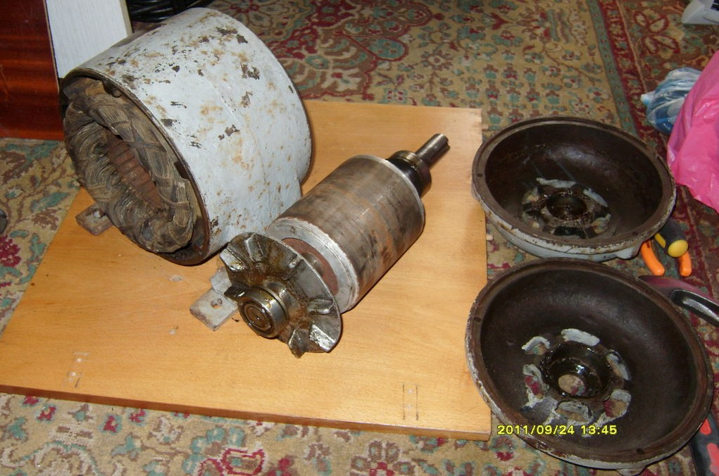 6-полюсна асинхронна машина с накъсо съединен ротор и вътрешно охлаждане, произведена в началото на 50-те години в силнотоковия завод край София